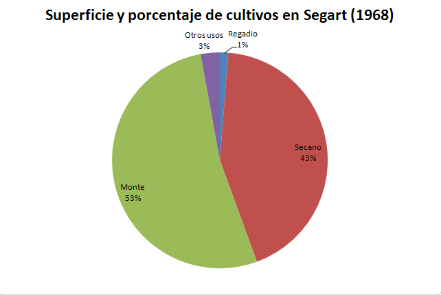 Gráfico de la superficie y proporción de cultivos en Segart (Valencia-España) en 1968